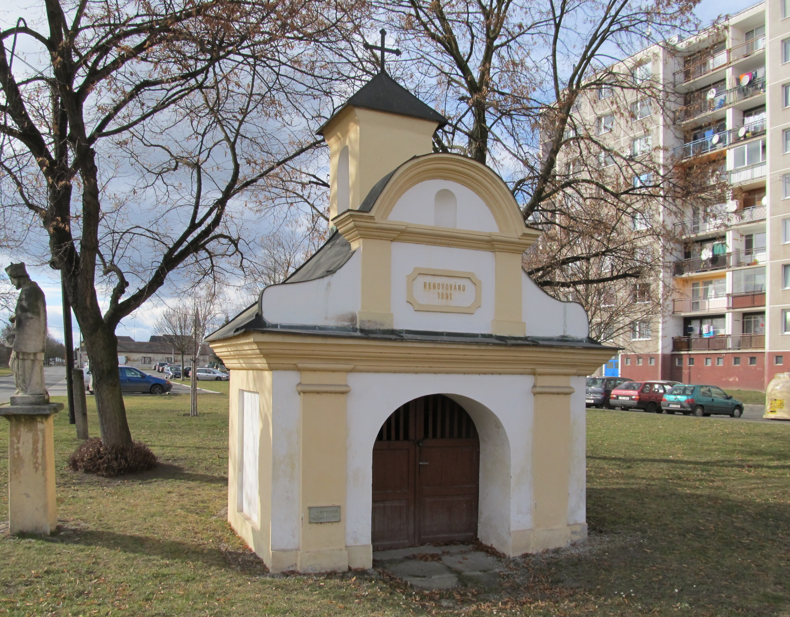 Nýřany - kaplička Panny Marie